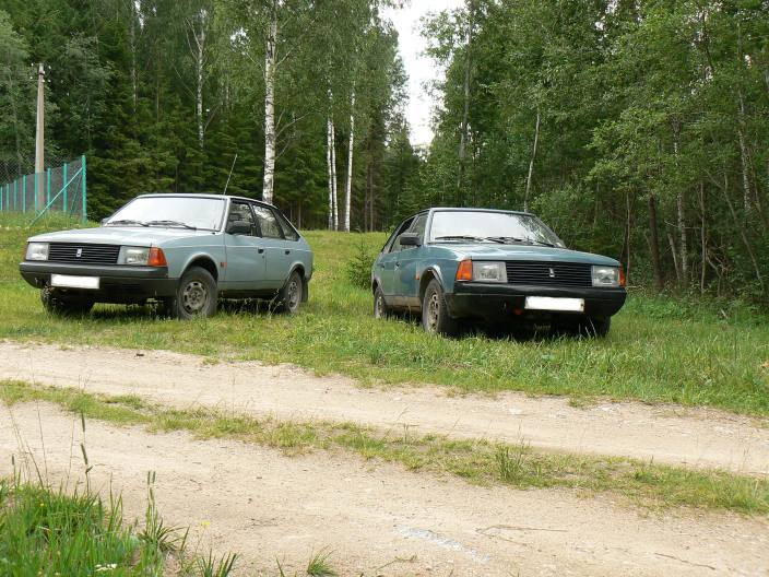 Moskvitš-2141